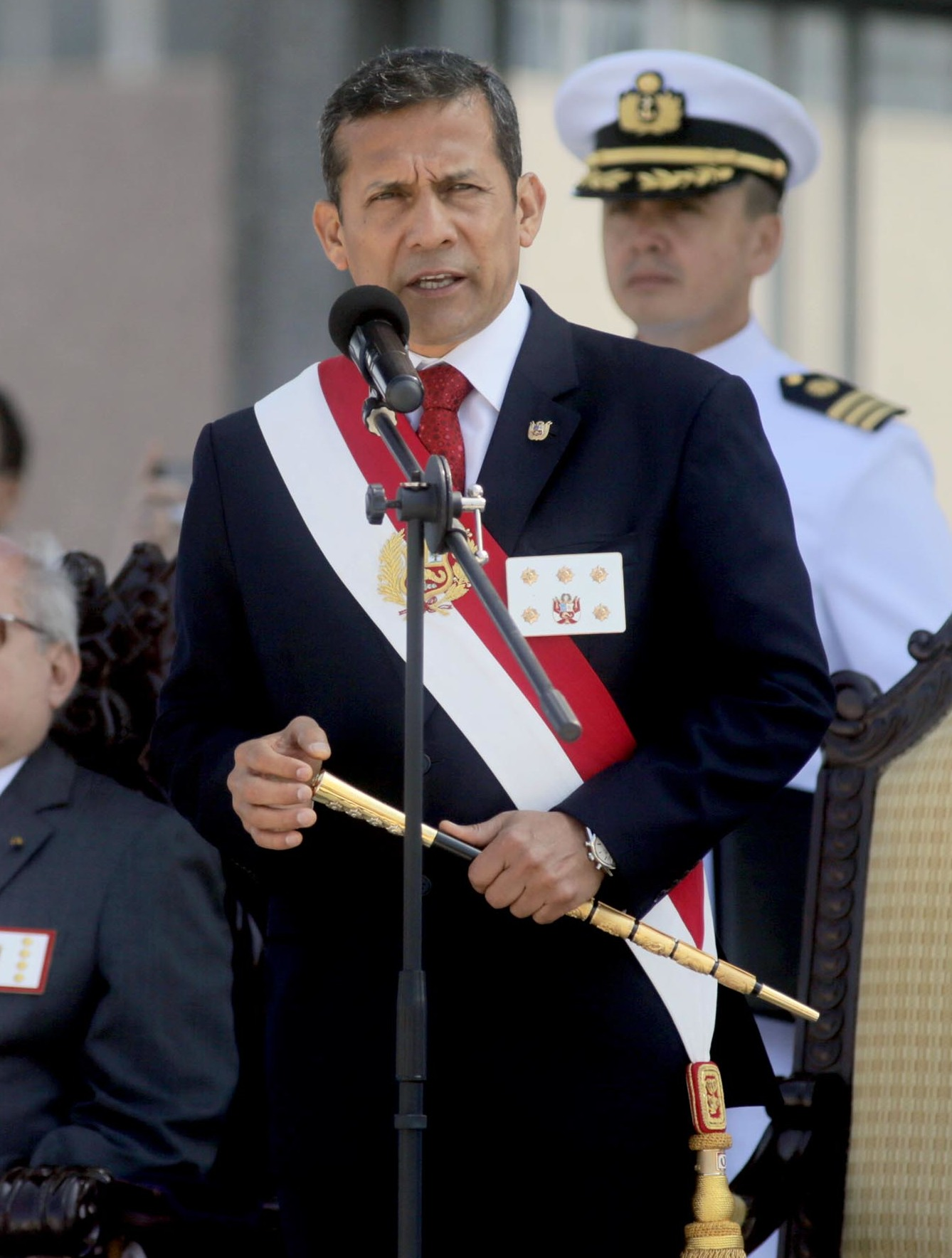 Ministro de Defensa, Pedro Cateriano acompaña al Presidente de la República, Ollanta Humala, en la ceremonia de graduación de cadetes de la Escuela Naval.